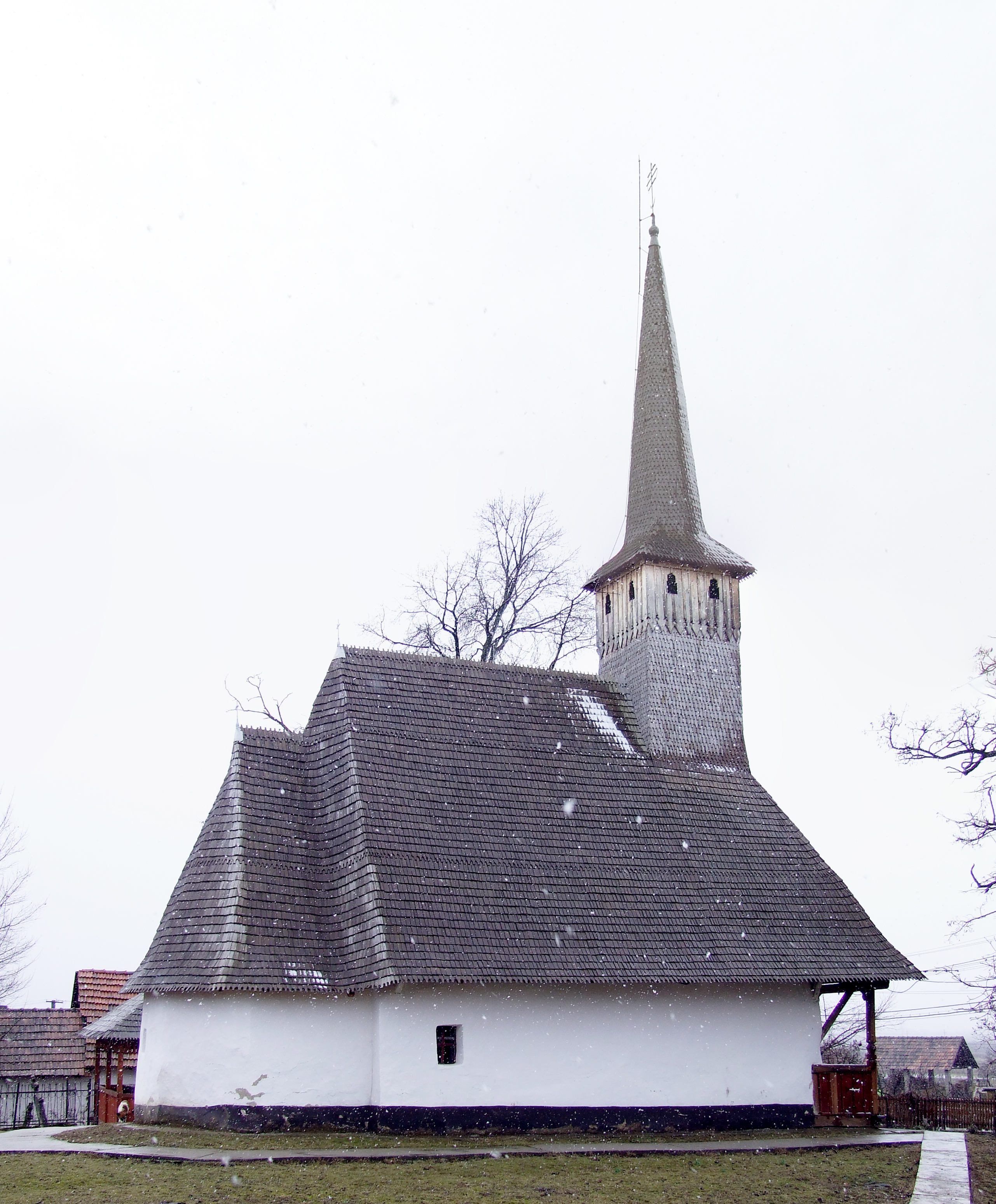 Biserica de lemn din Botean, judeţul Bihor.